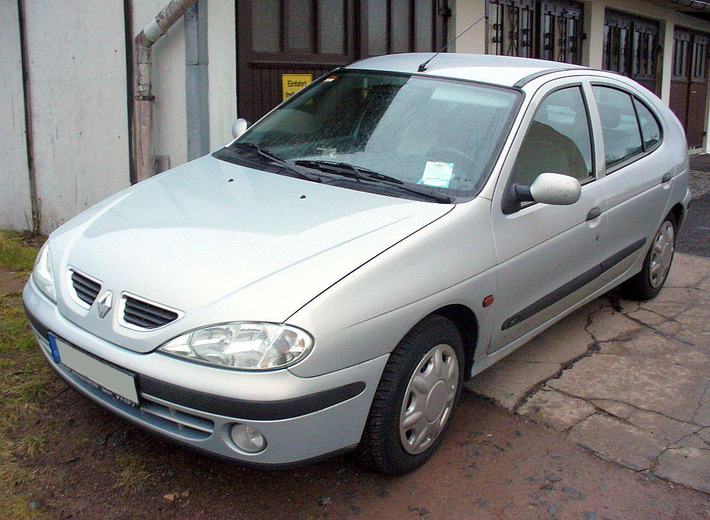 Renault Mégane I Phase I